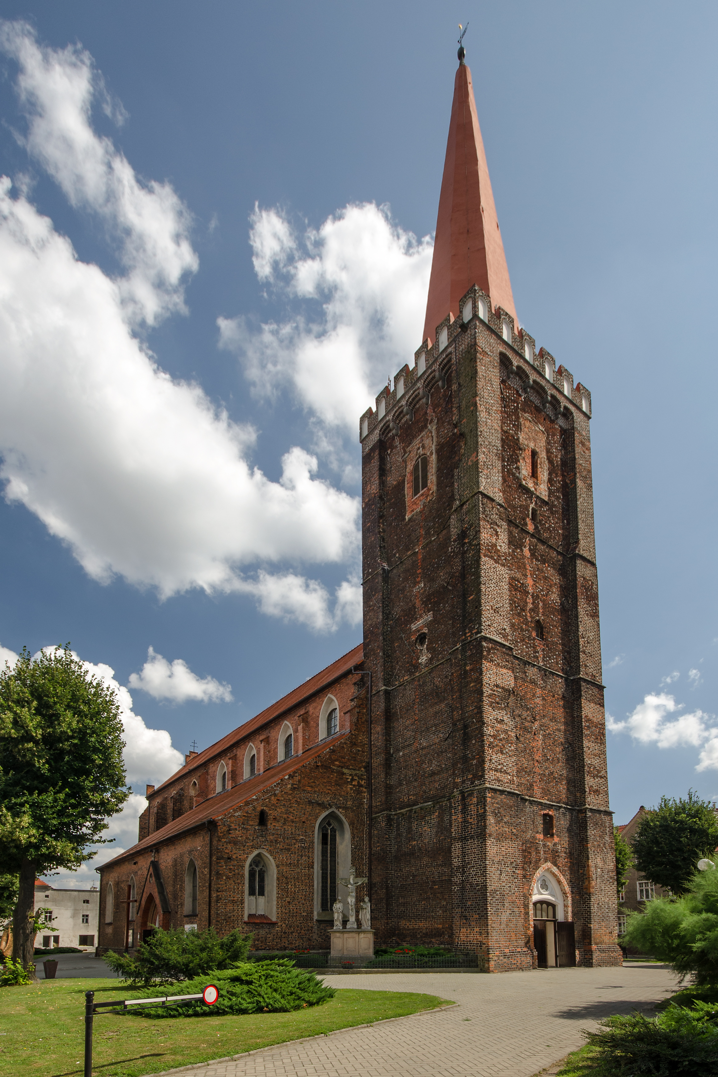 Grodków, kościół par. p.w. św. Michała, kon. XII, XV, XVII